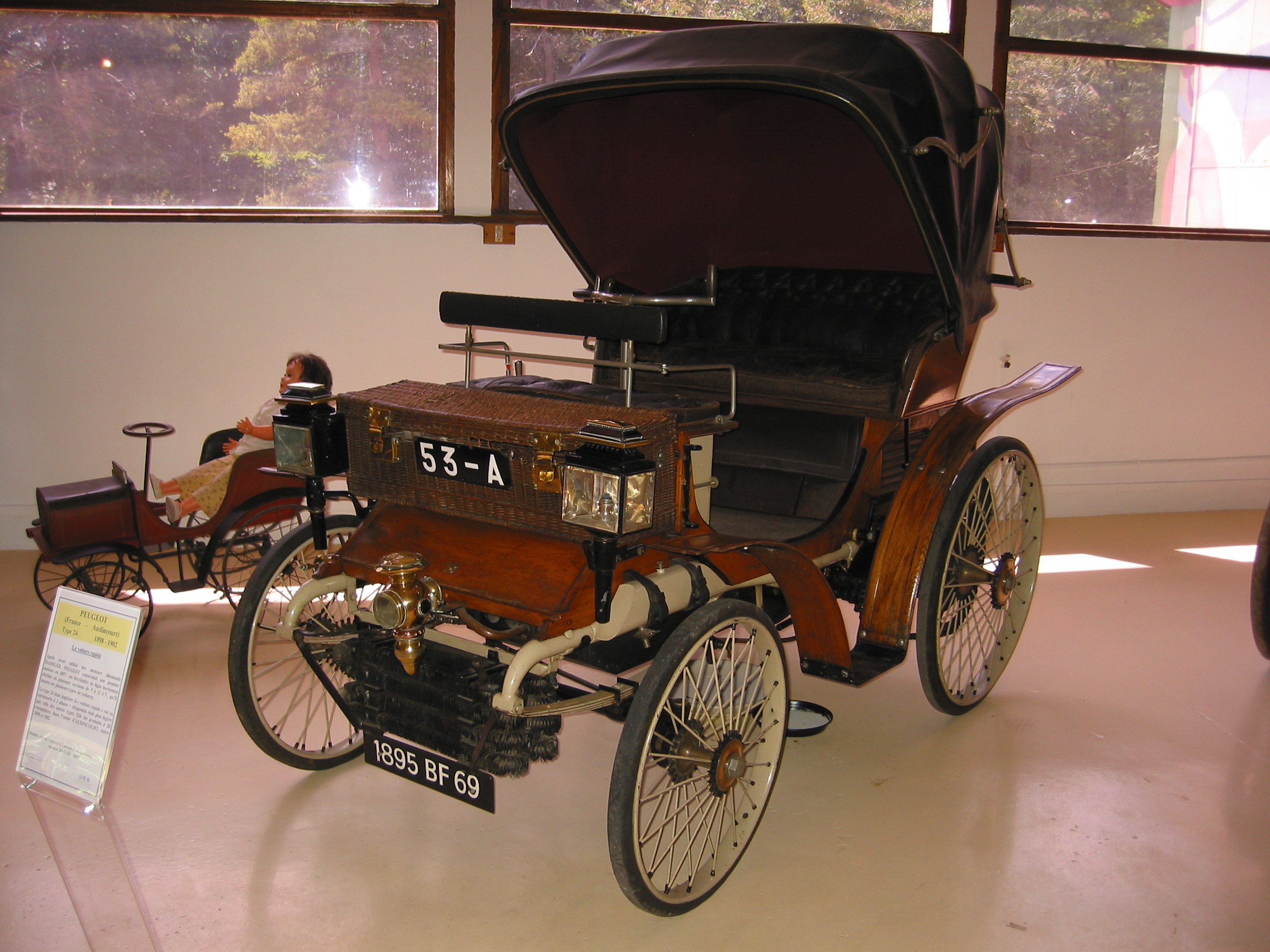 Peugeot Typ 24 1899